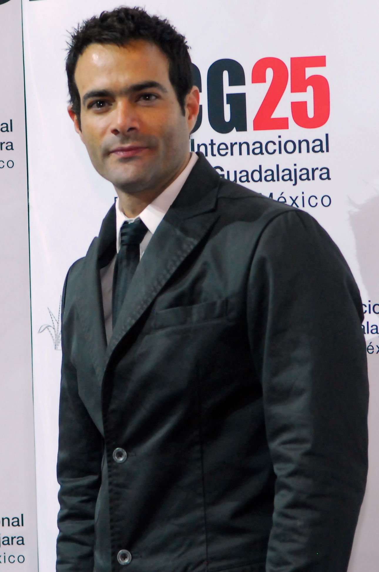 13.03.10 Gala de Homenaje Nacional. Roberto Guzmán © Cortesía de FICG 25/ Oscar Delgado